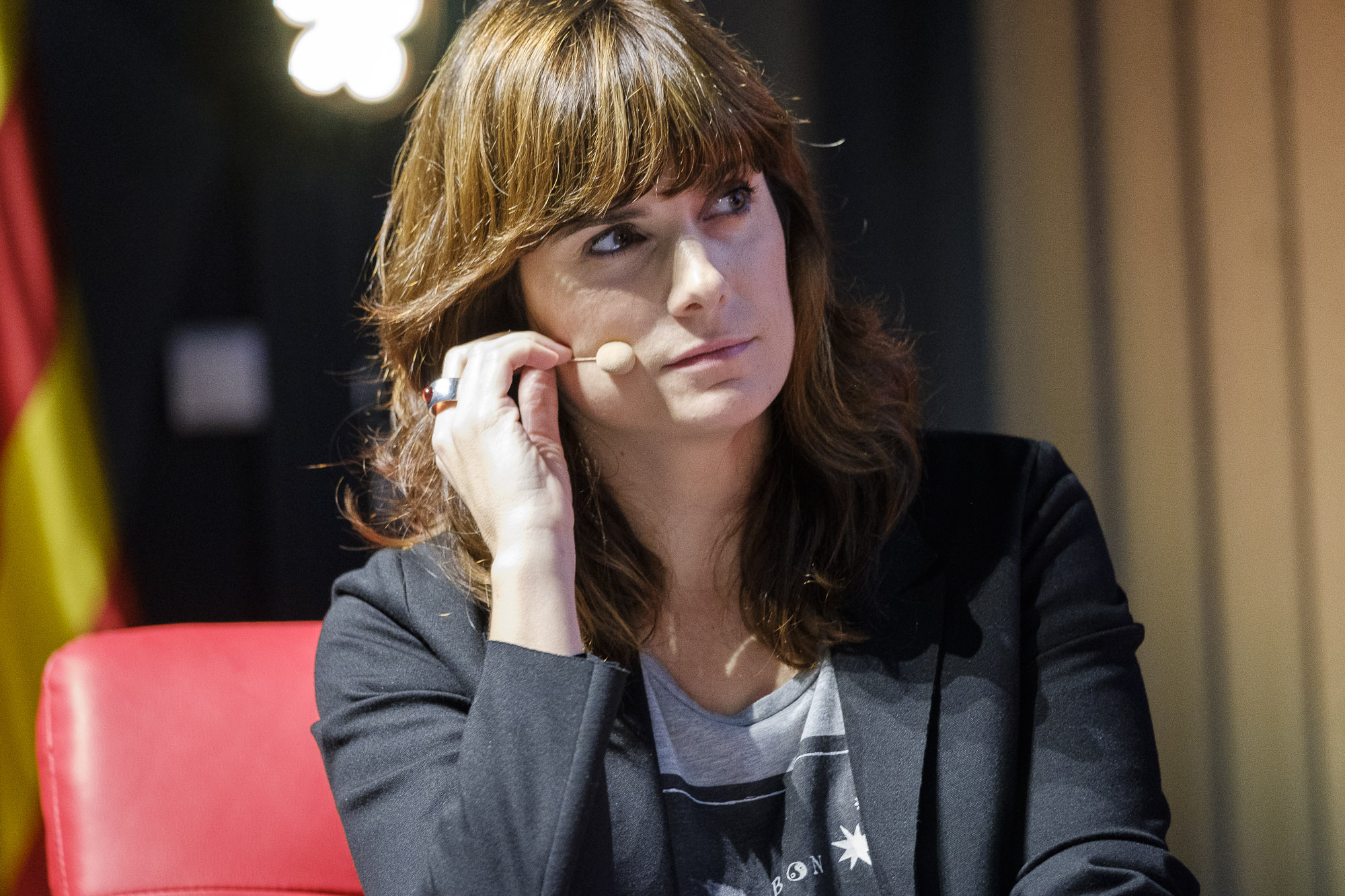 Catosfera 2018 divendres tarda